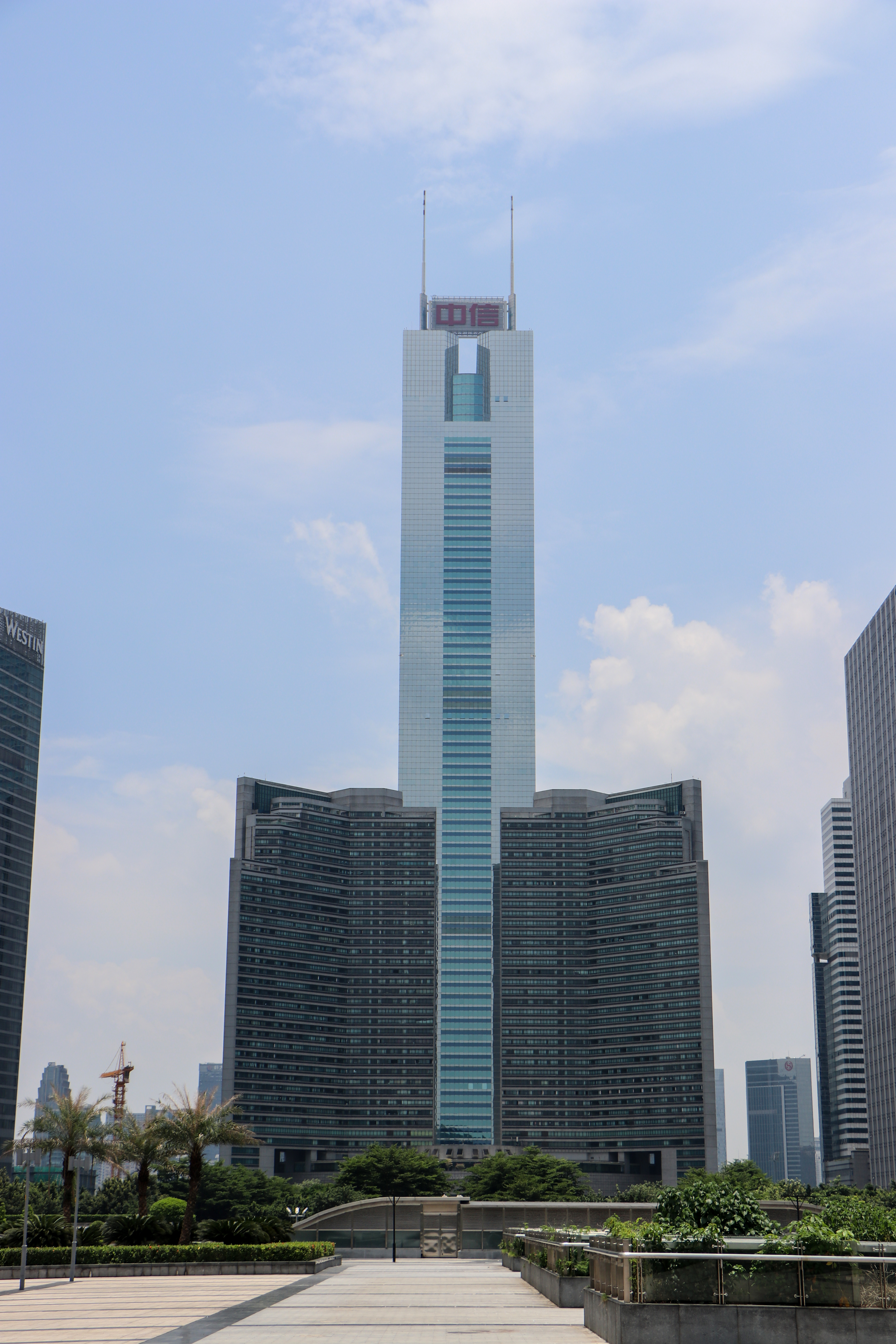 中信广场（摄于2018年7月）